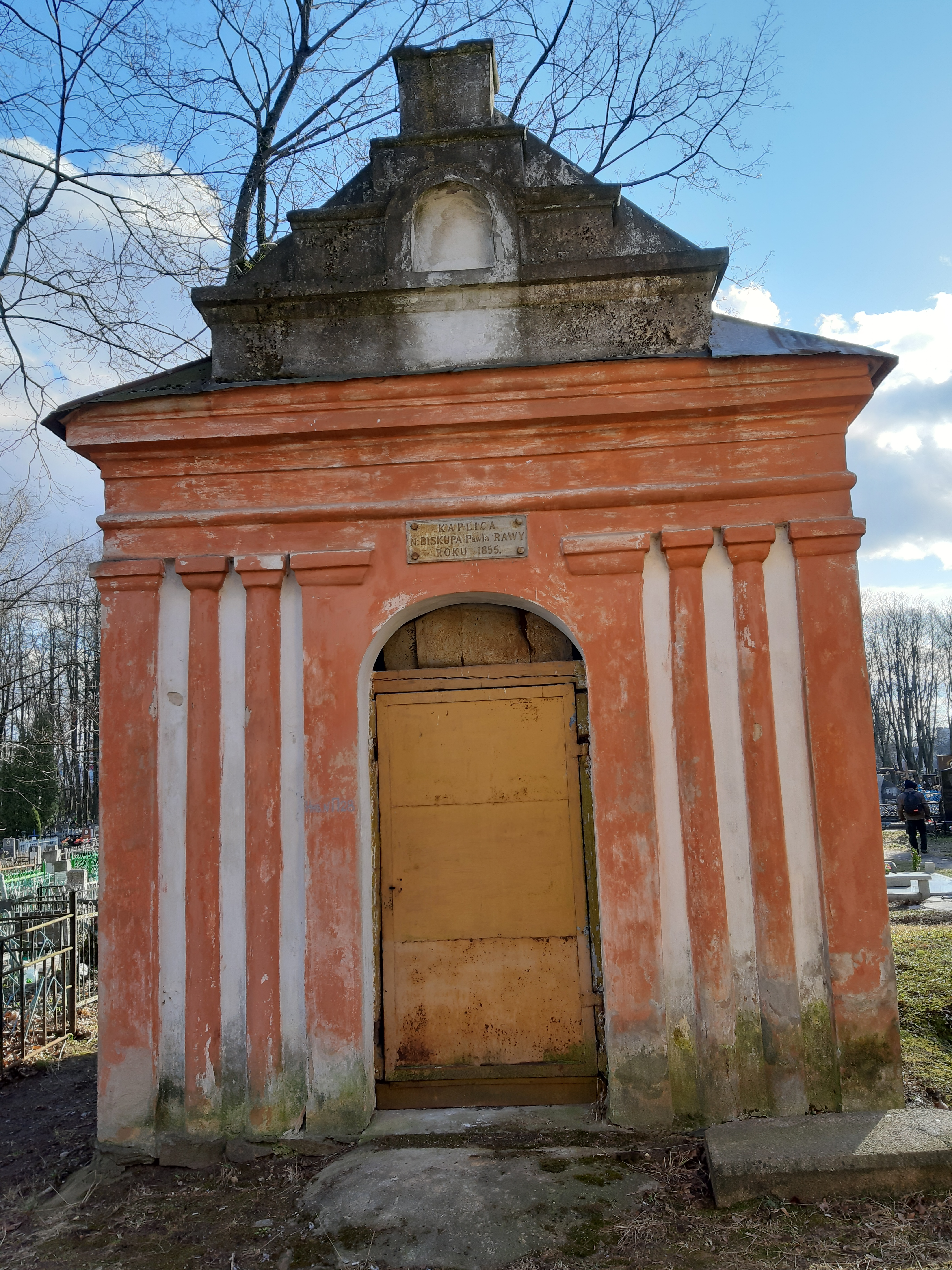 Мінск. Кальварыйскія могілкі. 2020